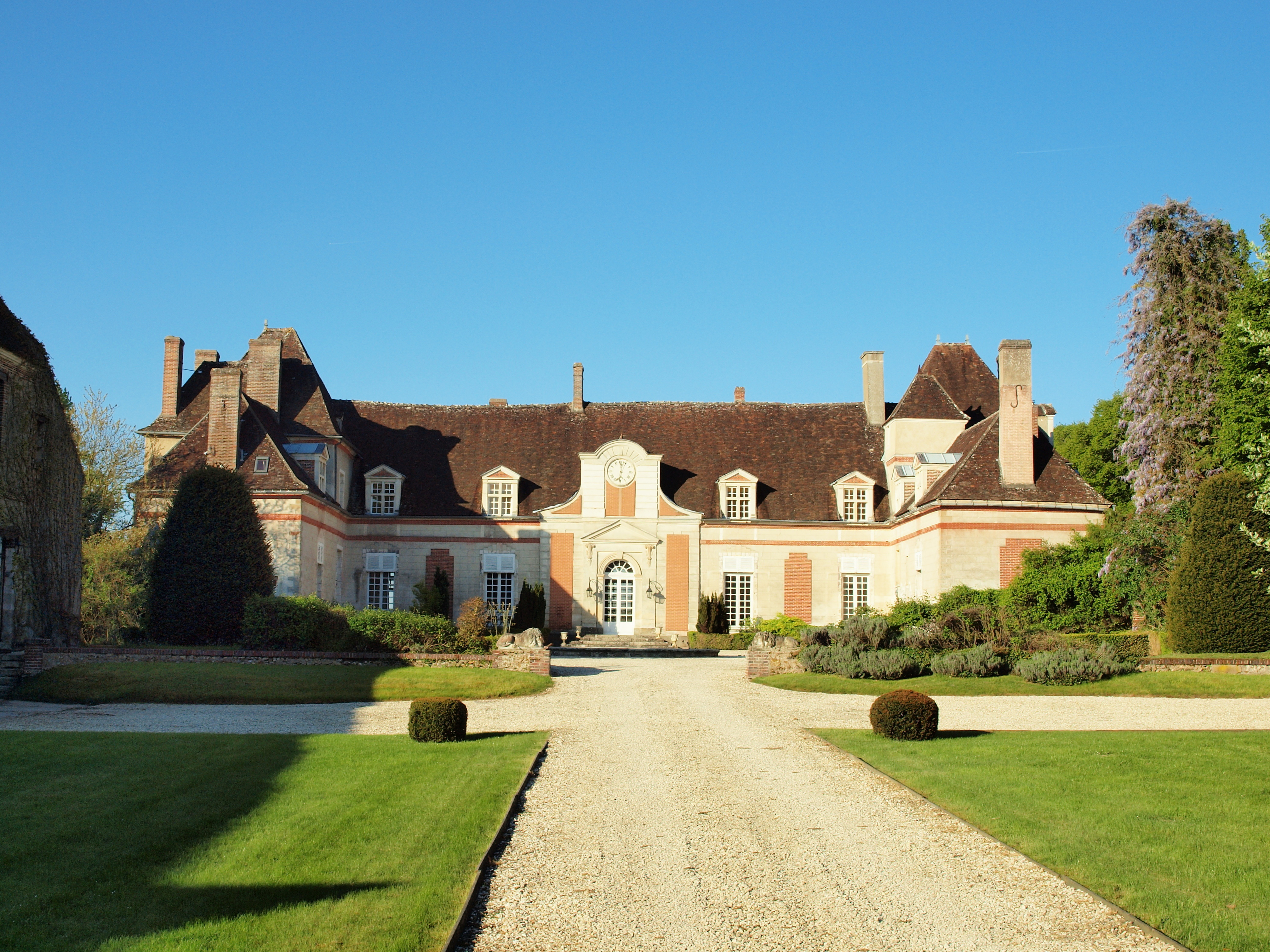 Château du Fey à Villecien (Yonne, France)